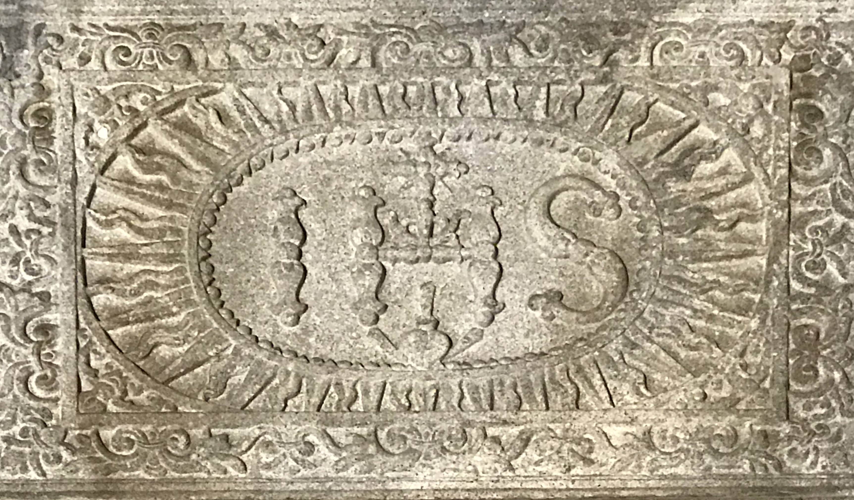 中文（台灣）: 大三巴上的耶穌會會徽。